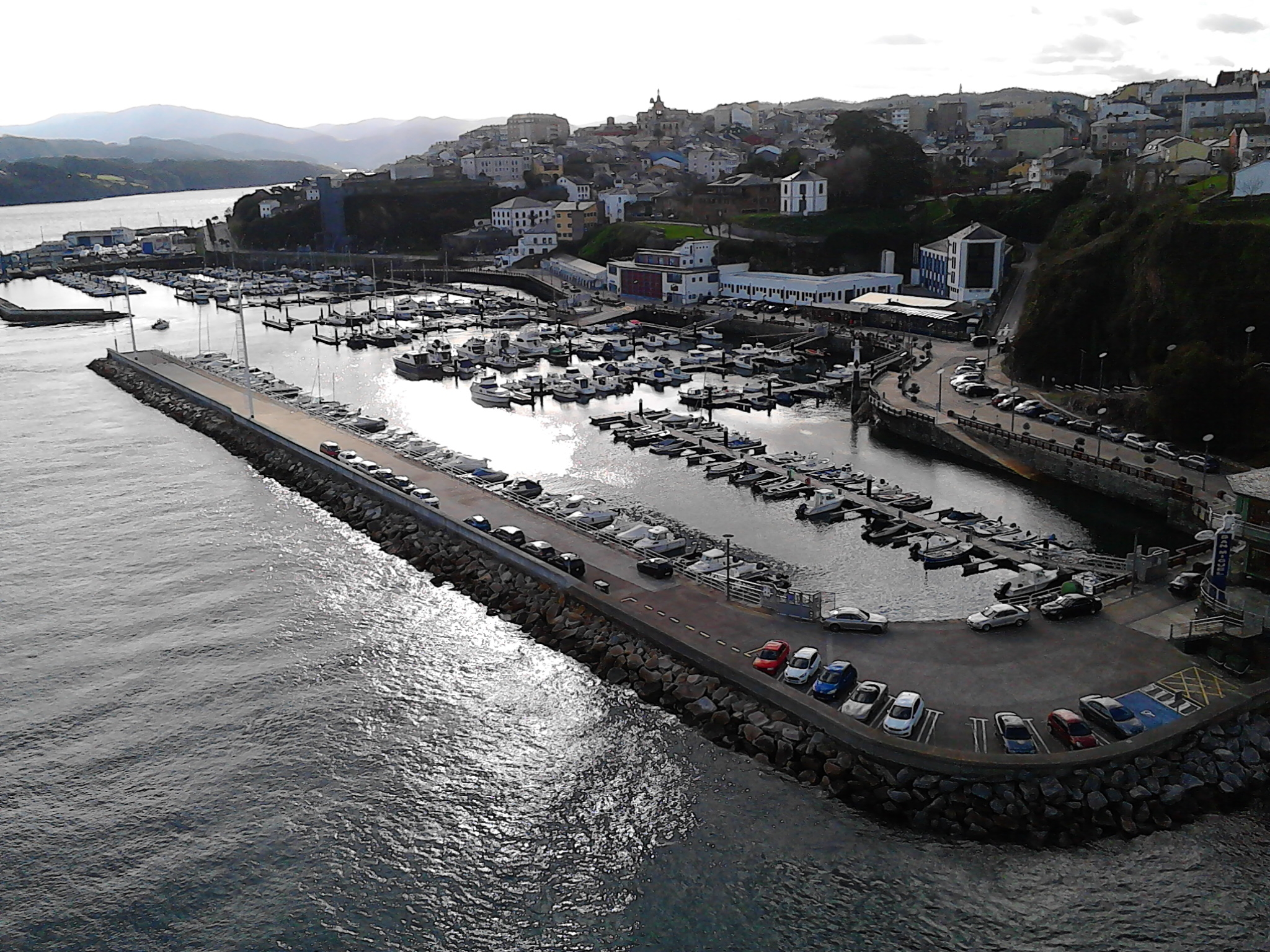 Porto deportivo de Ribadeo, dende a Ponte dos Santos